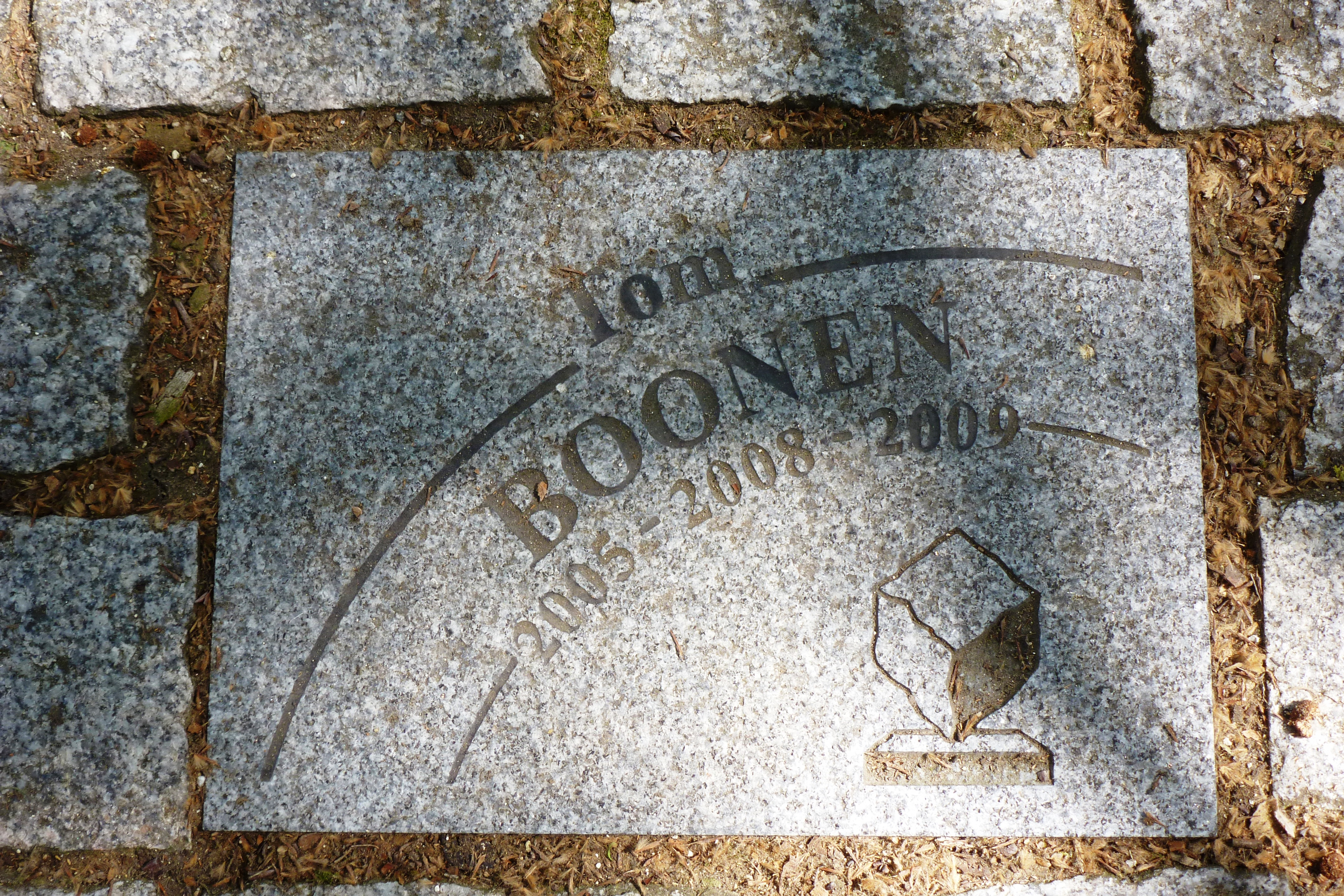 Pflasterstück für Tom Boonen auf der Allée Charles Crupelandt in Roubaix